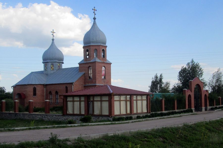 Церква Архангела Михаїла у с. Манжелія, Глобинський район, Полтавська область